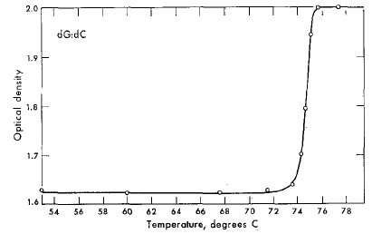 גרף של צפיפות אופטית של פולימר dG:dC כפונקציה של הטמפרטורה.